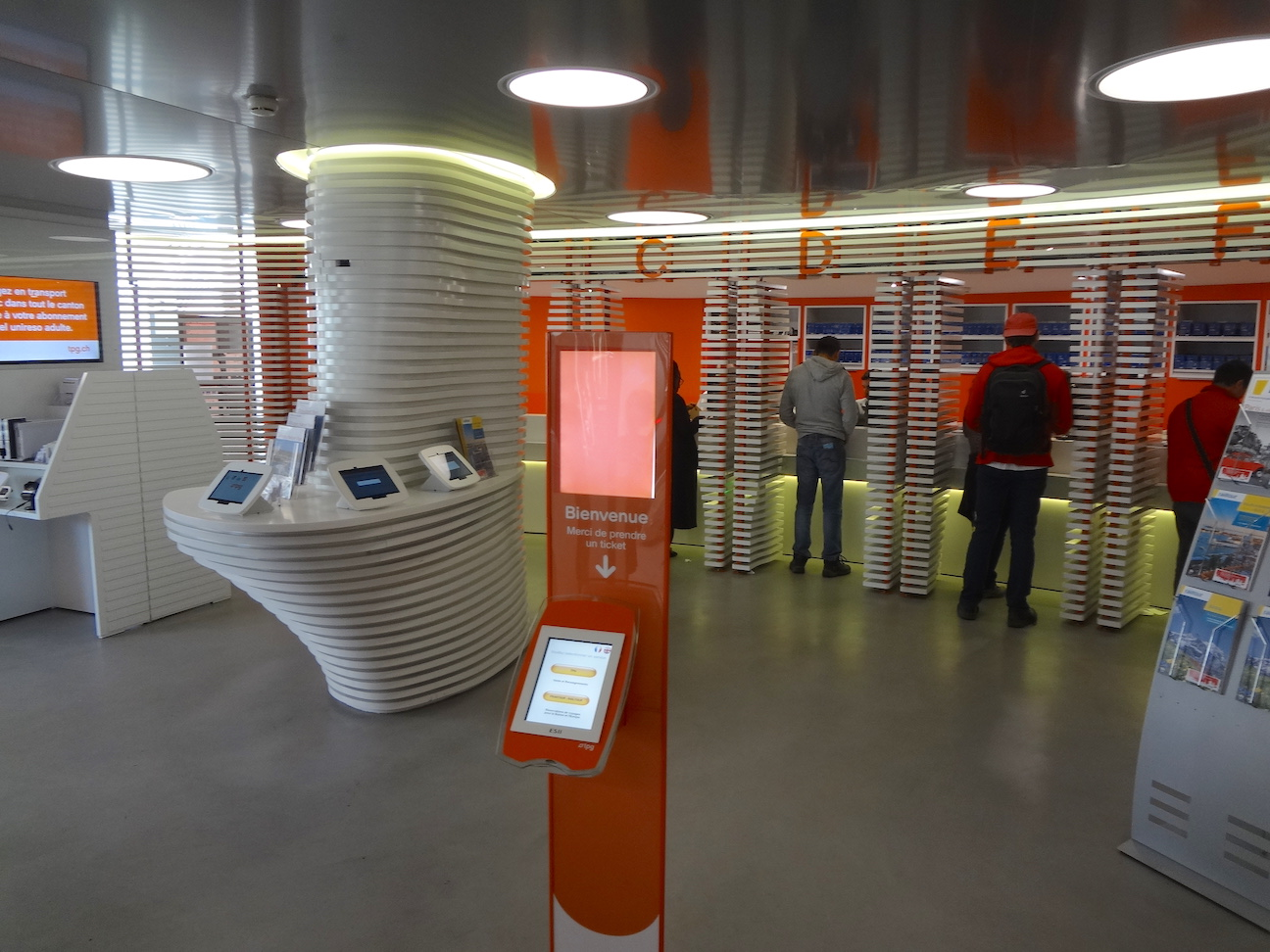 Guichets des transports publics genevois (TPG), dans le bâtiment de la gare Cornavin à Genève.